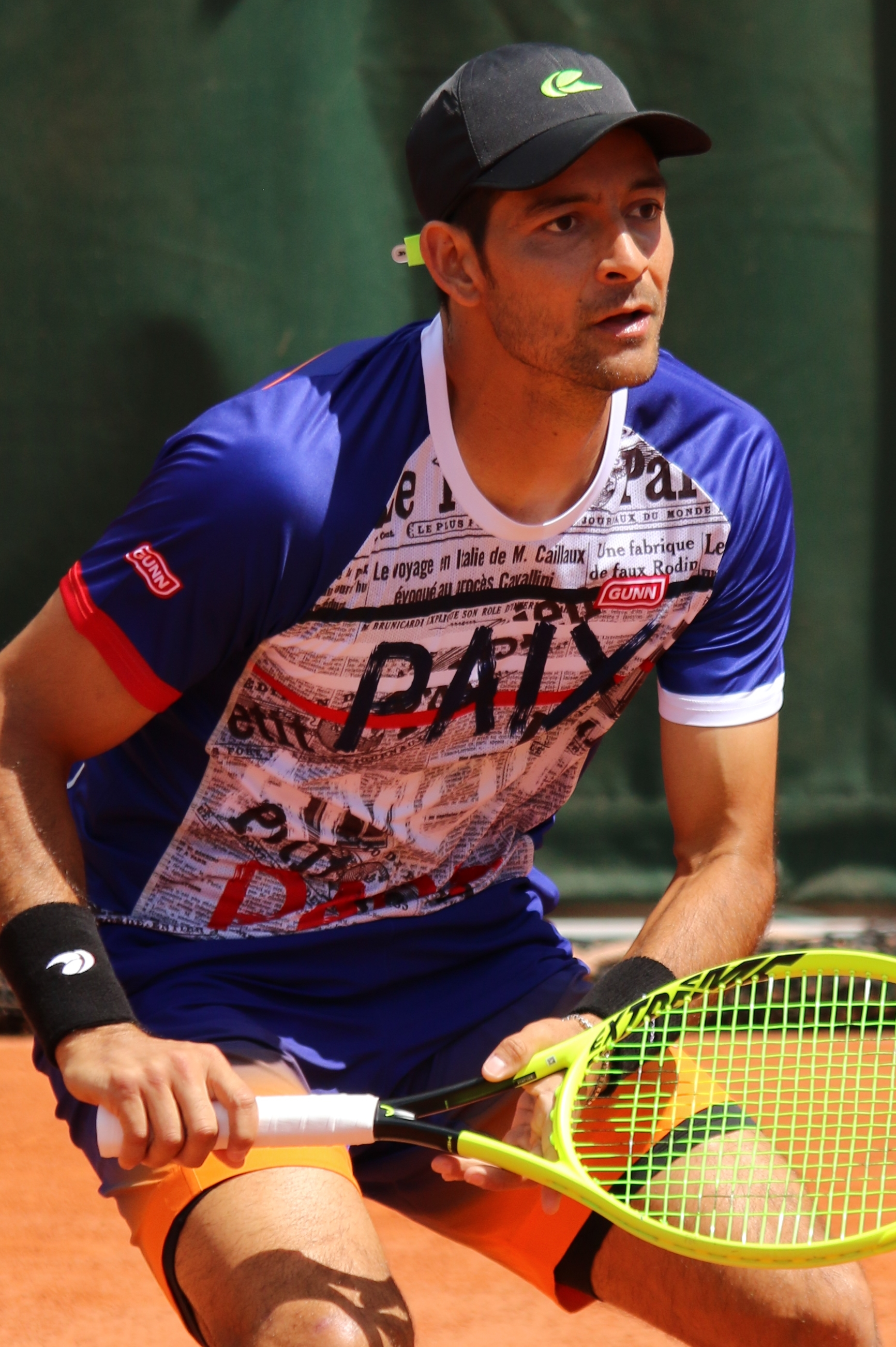 Arevalo RG19 (24)